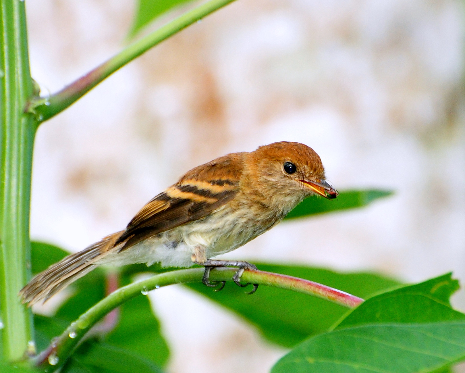 Lanchonete OASYS - Margem do rio Ribeira de Iguape - Registro-SP - Brasil